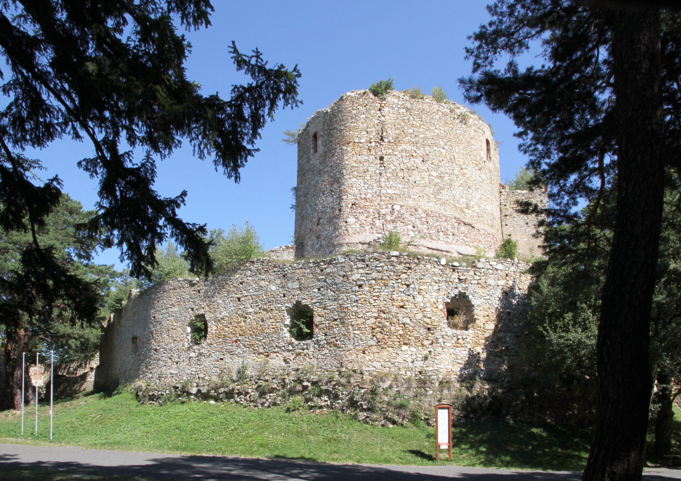 Hauptturm (Donjon) und 4. Mauer der Burgruine Landsee in Landsee, ein Ortsteil der burgenländischen Marktgemeinde Markt St. Martin.